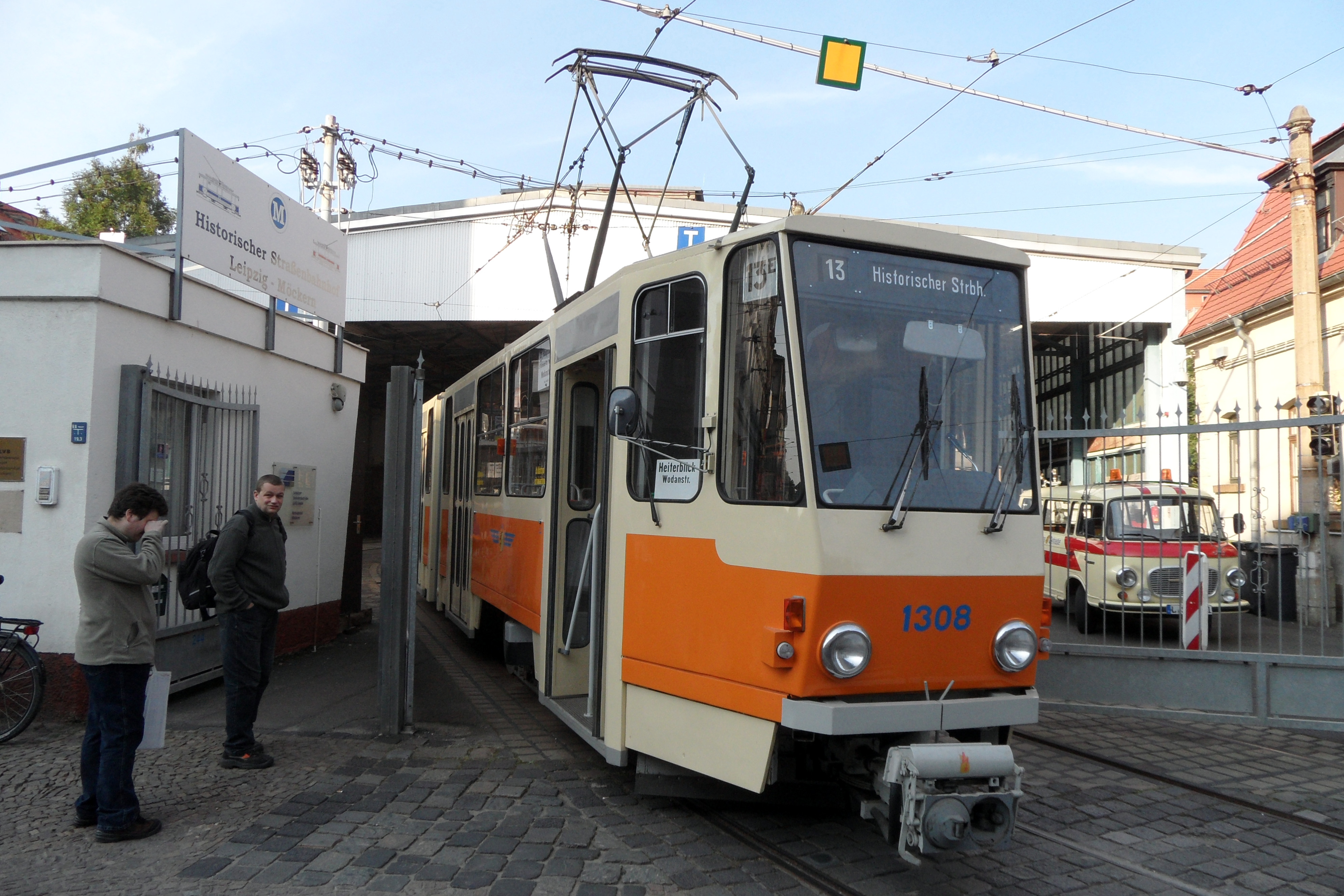 An der Einfahrt von der Georg-Schumann-Straße, der Triebwagen 1308 wurde gegen den Widerstand der LVB-Führung 1997 aus Berlin zurückgeholt und dann mehrere Jahre im Heizwerk Südost untergestellt. Seit 2003 ist der letzte der acht nach Leipzig gelieferten KT4 im Museumsbestand.